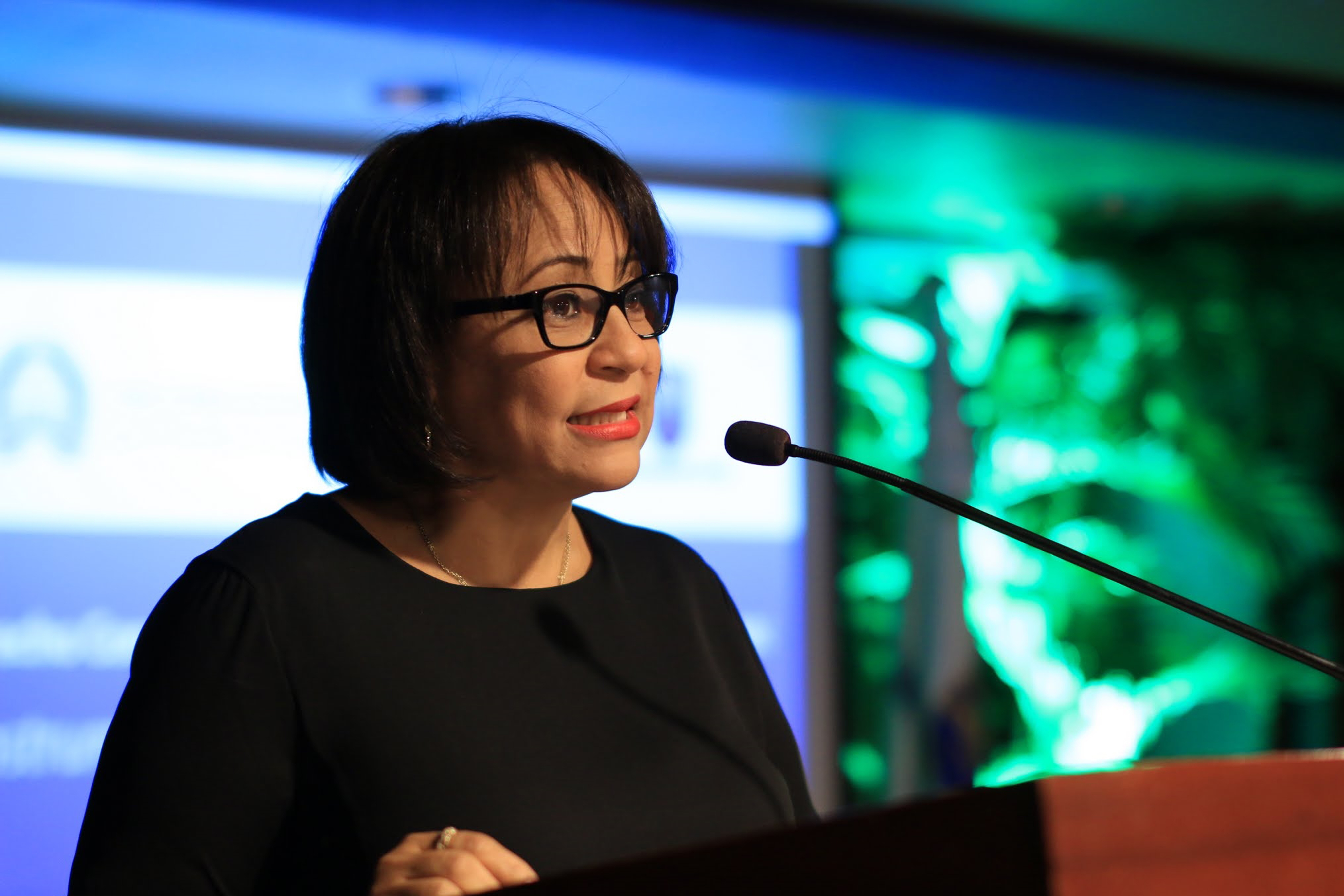 Yildalina Tatem Brache en una conferencia sobre derechos de las mujeres